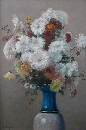 Bodegon Crisantemos